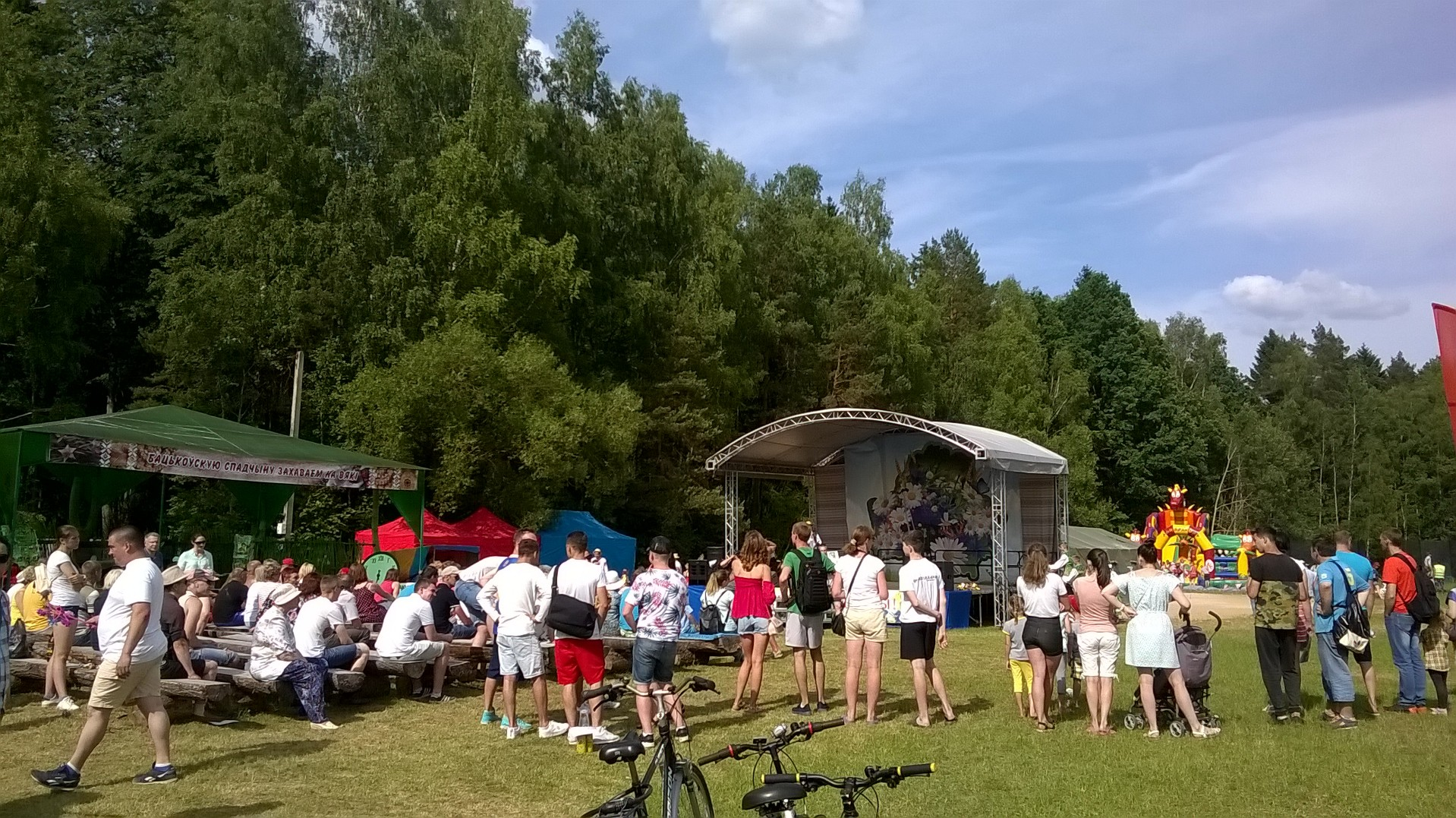 Фестывальная сцэна на Аўгустоўскім канале падчас ХII Рэспубліканскага фестывалю нацыянальных культур у Гродна 3 чэрвеня 2018 года.